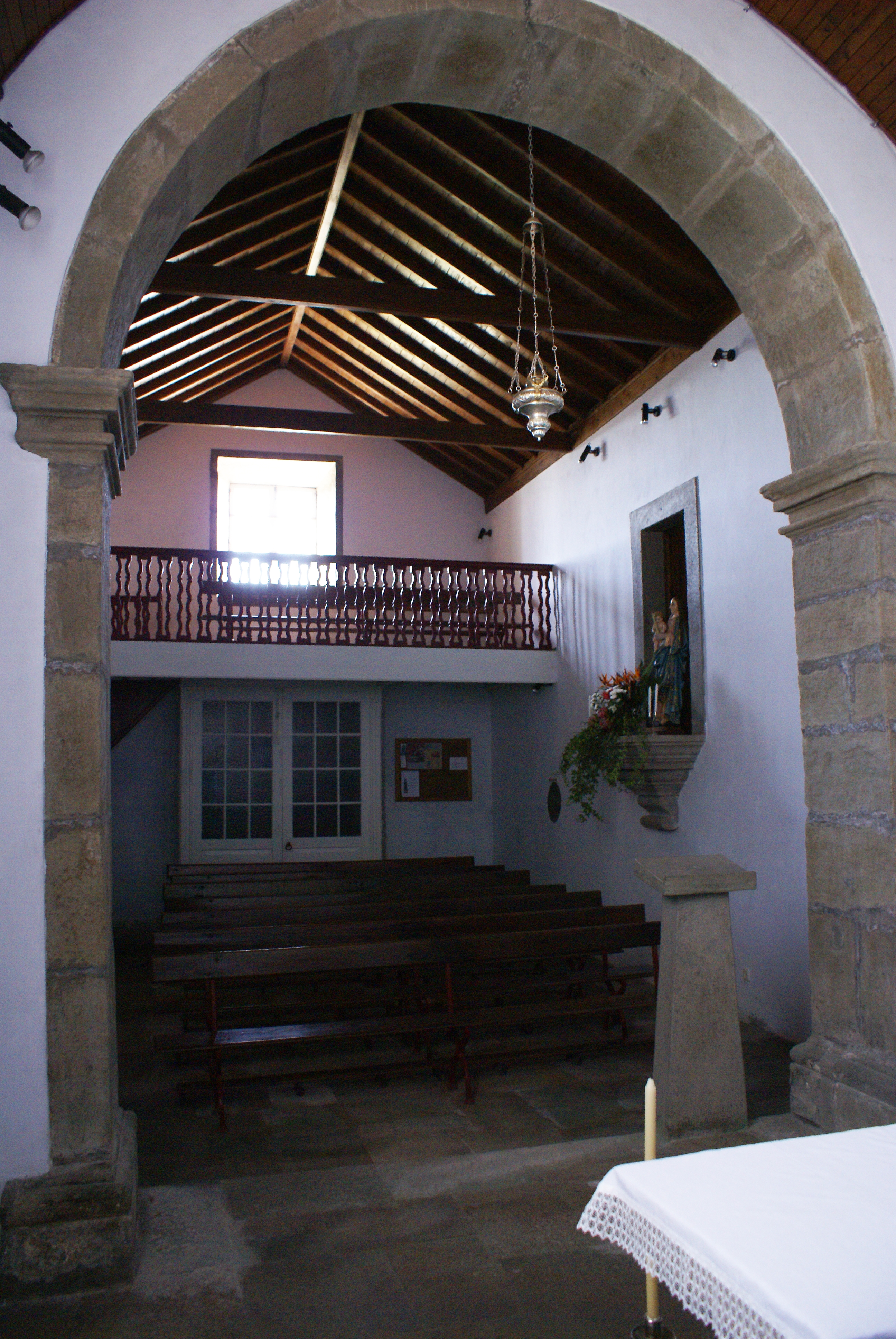 Ermida de Nossa Senhora da Luz, São Mateus da Calheta, Angra do Heroísmo, Arquivo de Villa Maria, ilha Terceira, Açores